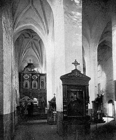 Беларуская (тарашкевіца): Наваградак (Navahradak), вуліца Базылянская (vulica Bazylanskaja). Царква Сьвятых Барыса і Глеба